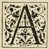 Ініціал А.